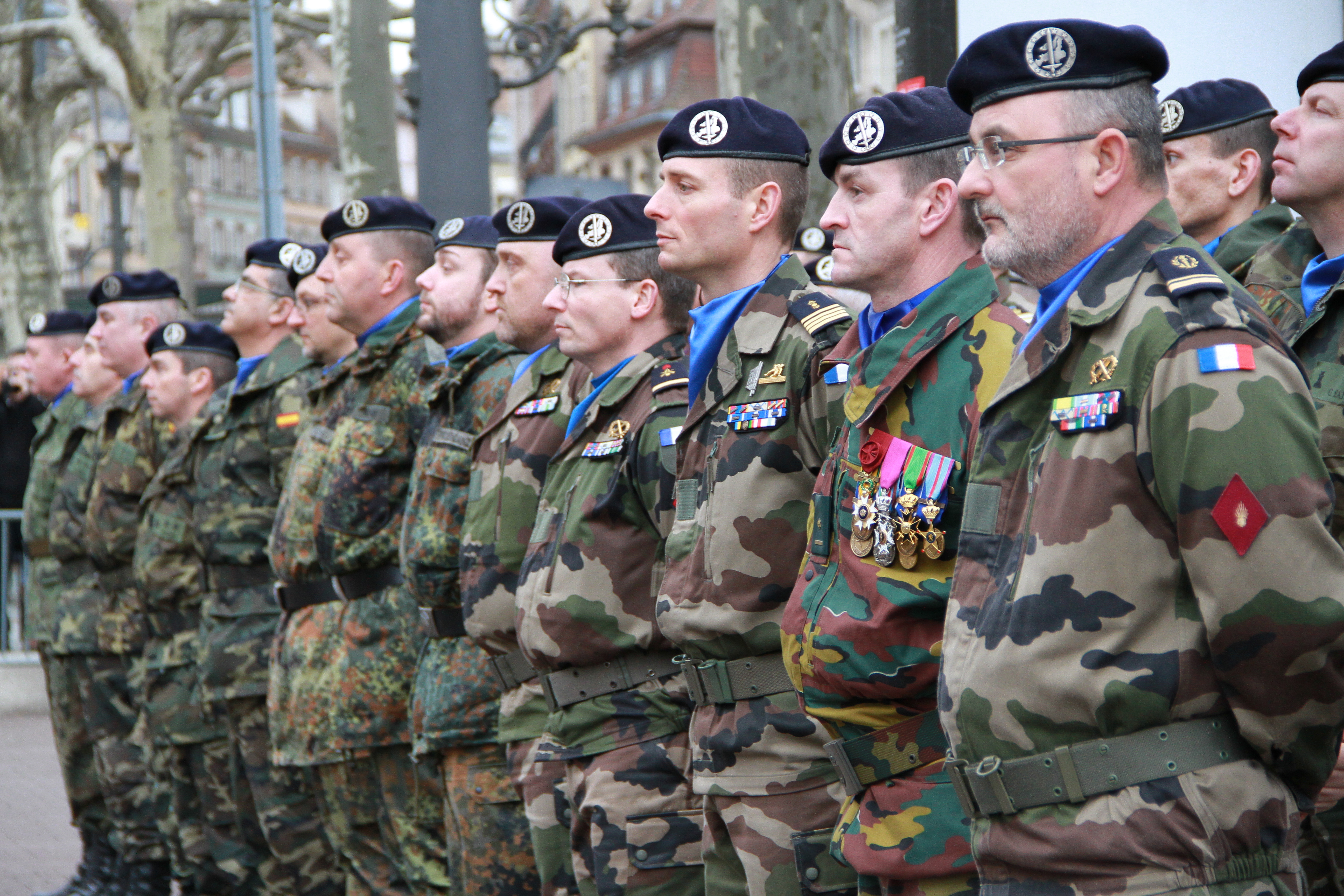 Eurocorps prise d’armes de fin de mission en Afghanistan, place Broglie à Strasbourg 31 janvier 201, en présence de M. Pieter De Crem, ministre belge de la Défense, et de M. Kader Arif, ministre délégué auprès du ministre de la Défense, chargé des Anciens Combattants.